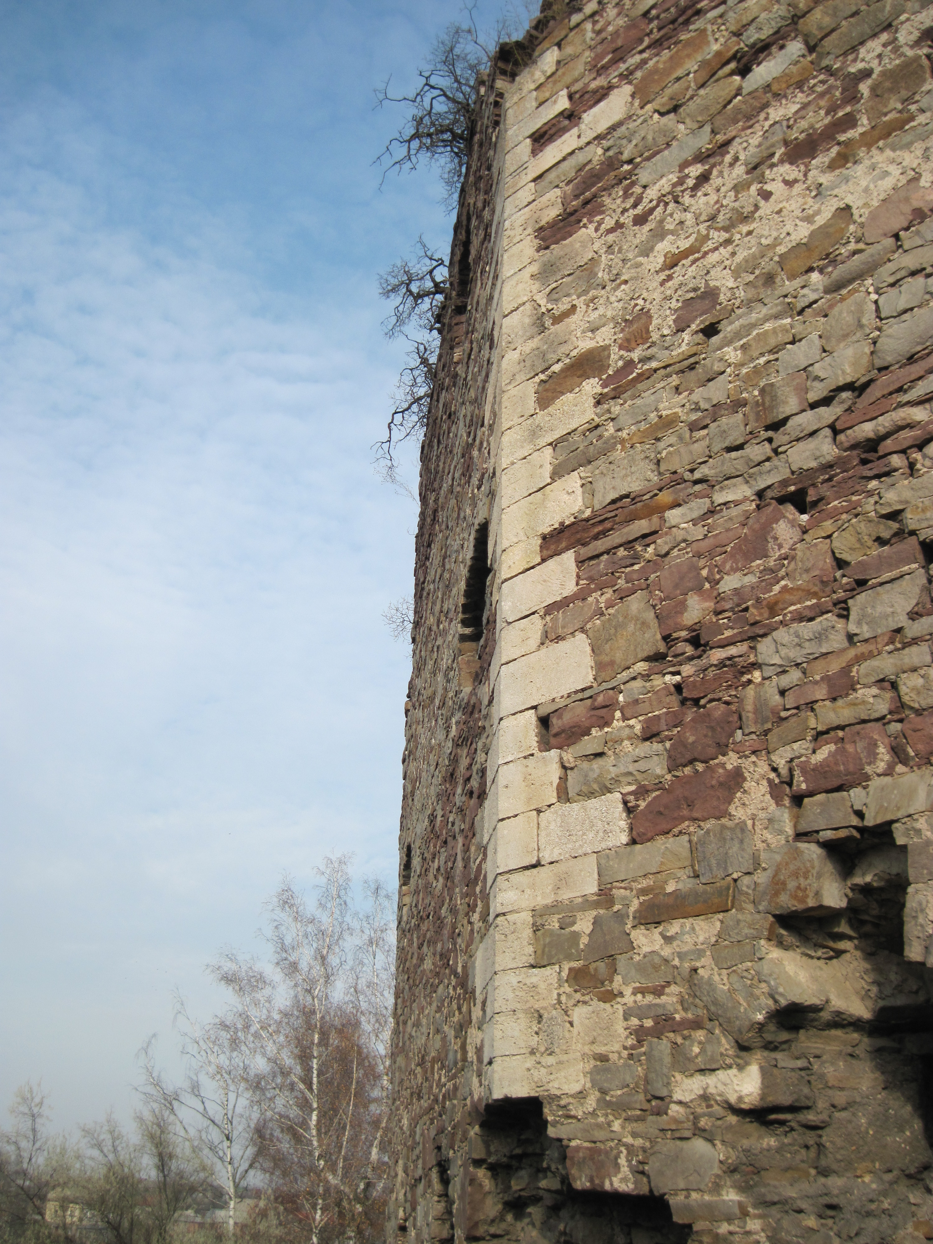 Кут стін замку, осінь 2013